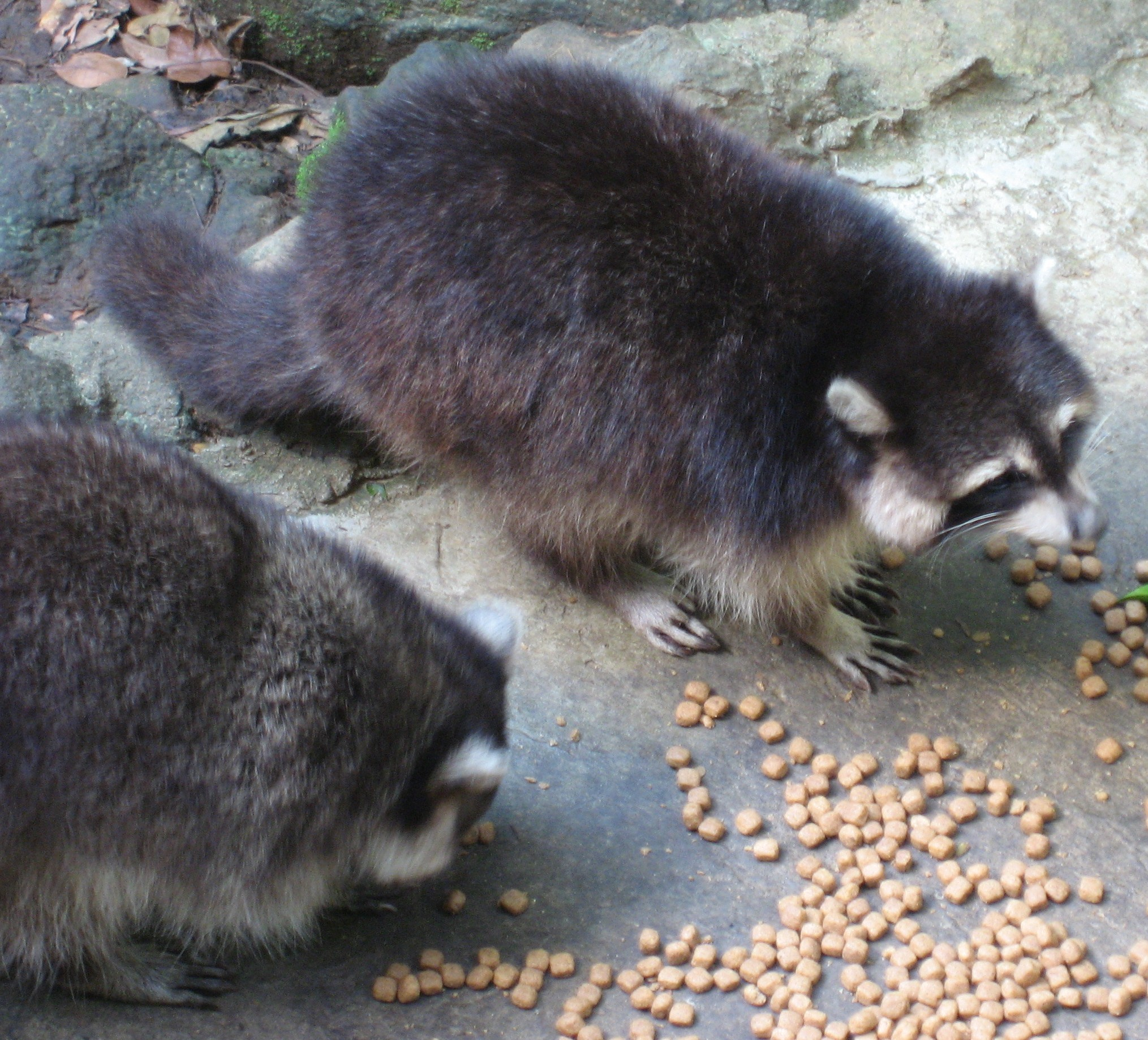 Procyon minor au Parc des Mamelles en Guadeloupe, Basse-Terre